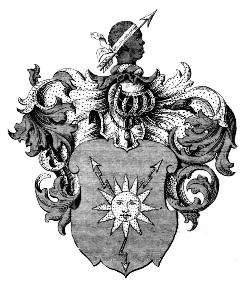 Scan aus Bagmihl, Pommersches Wappenbuch, Band 2, Stettin 1846